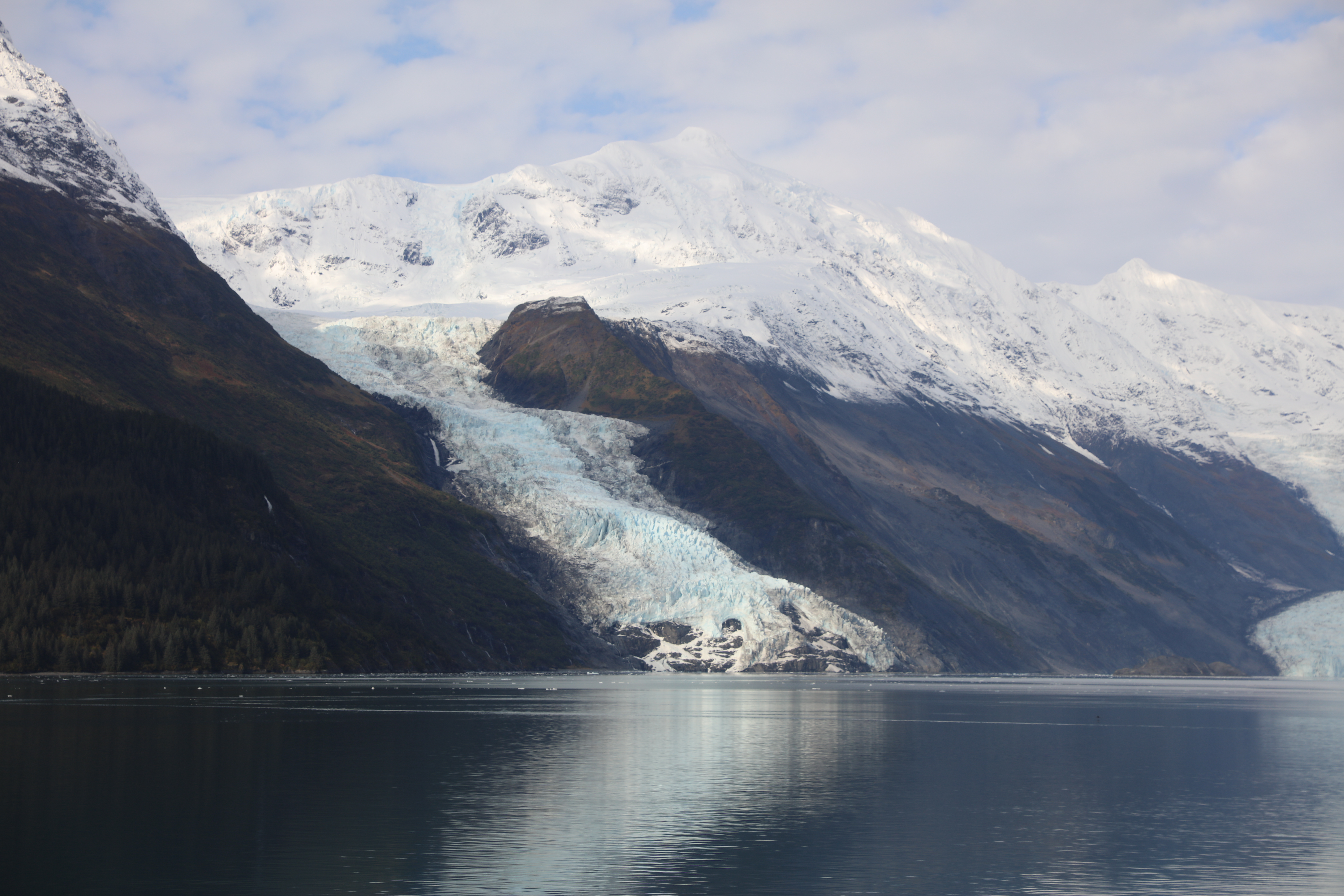 Il ghiacciaio in Settembre